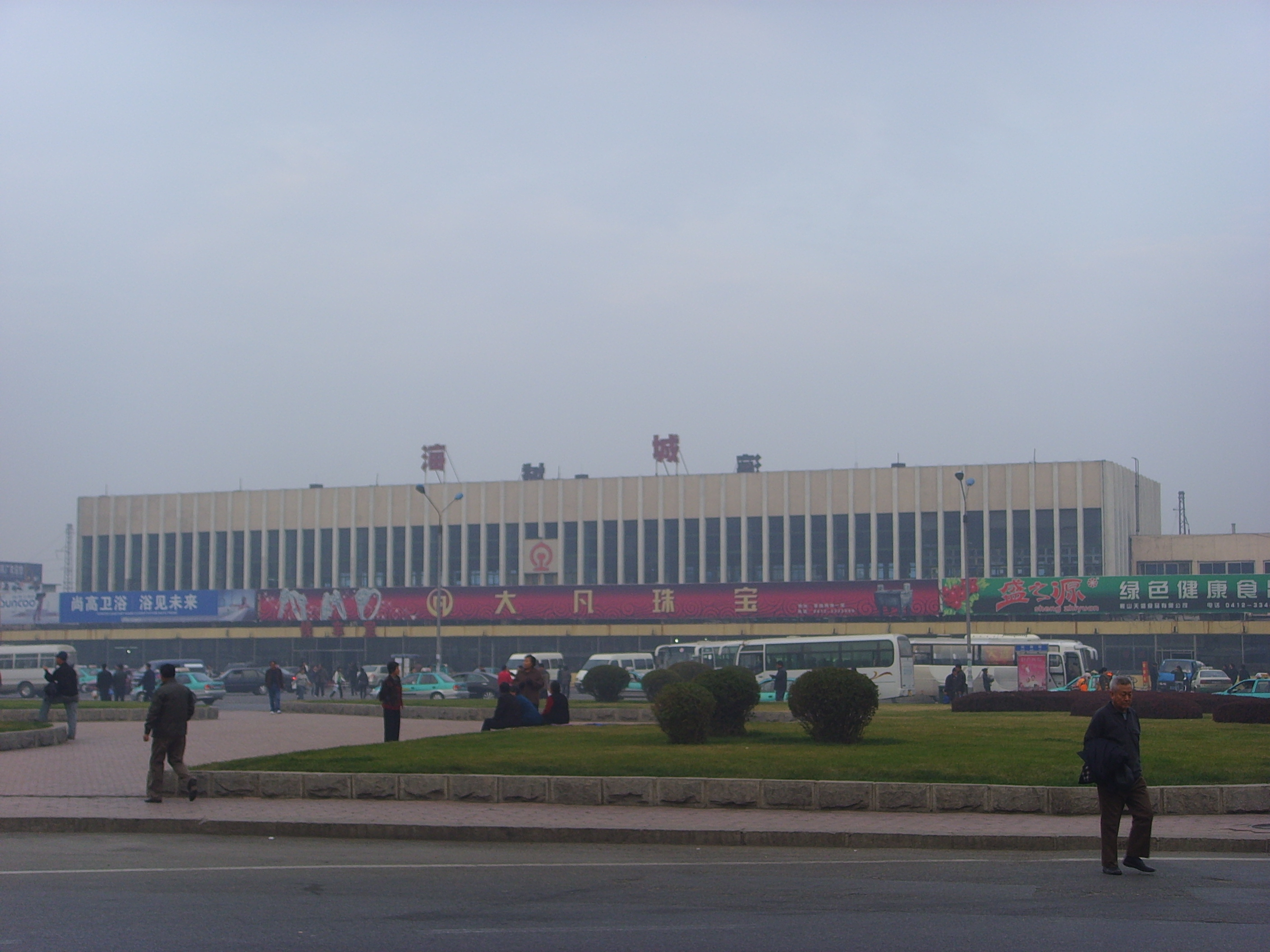 海城火车站